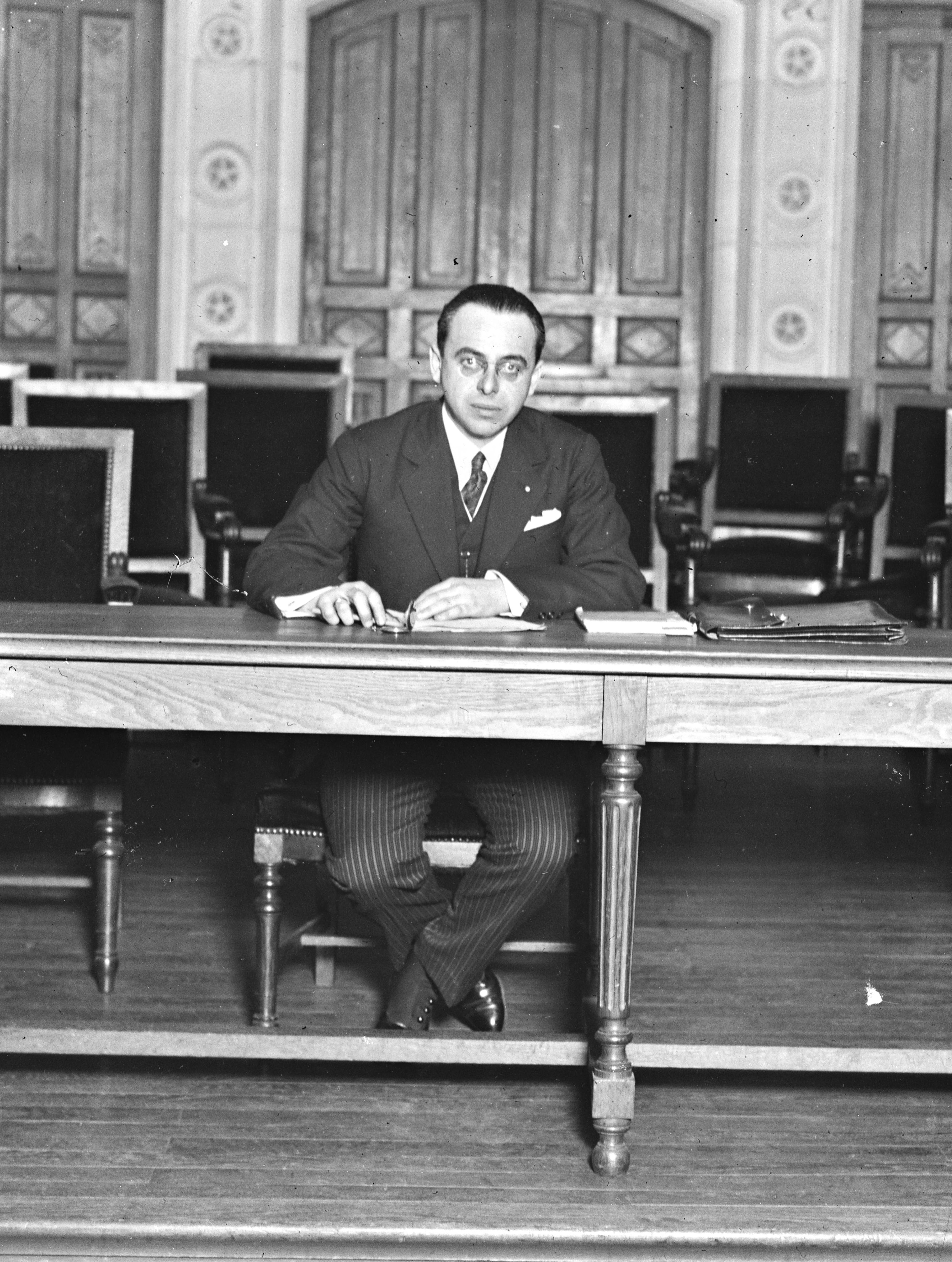 Cours du professeur Boris Mirkine-Guetzévitch, à Paris, le 26 janvier 1926 à la faculté de droit. Agence photographique : Agence Rol (Référence bibliographique : Rol, 106822). Format : 1 photogr. nég. sur verre ; 13 x 18 cm. Source : Bibliothèque nationale de France, département Estampes et photographie, EI-13 (1289). Il s'agit d'un extrait de la photographie originale, visible sur Gallica